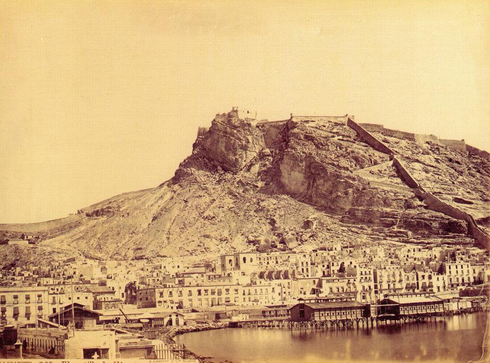 Vista del castell d'Alacant dominant tota la ciutat. Foto de Jean lauren (1816-1886).